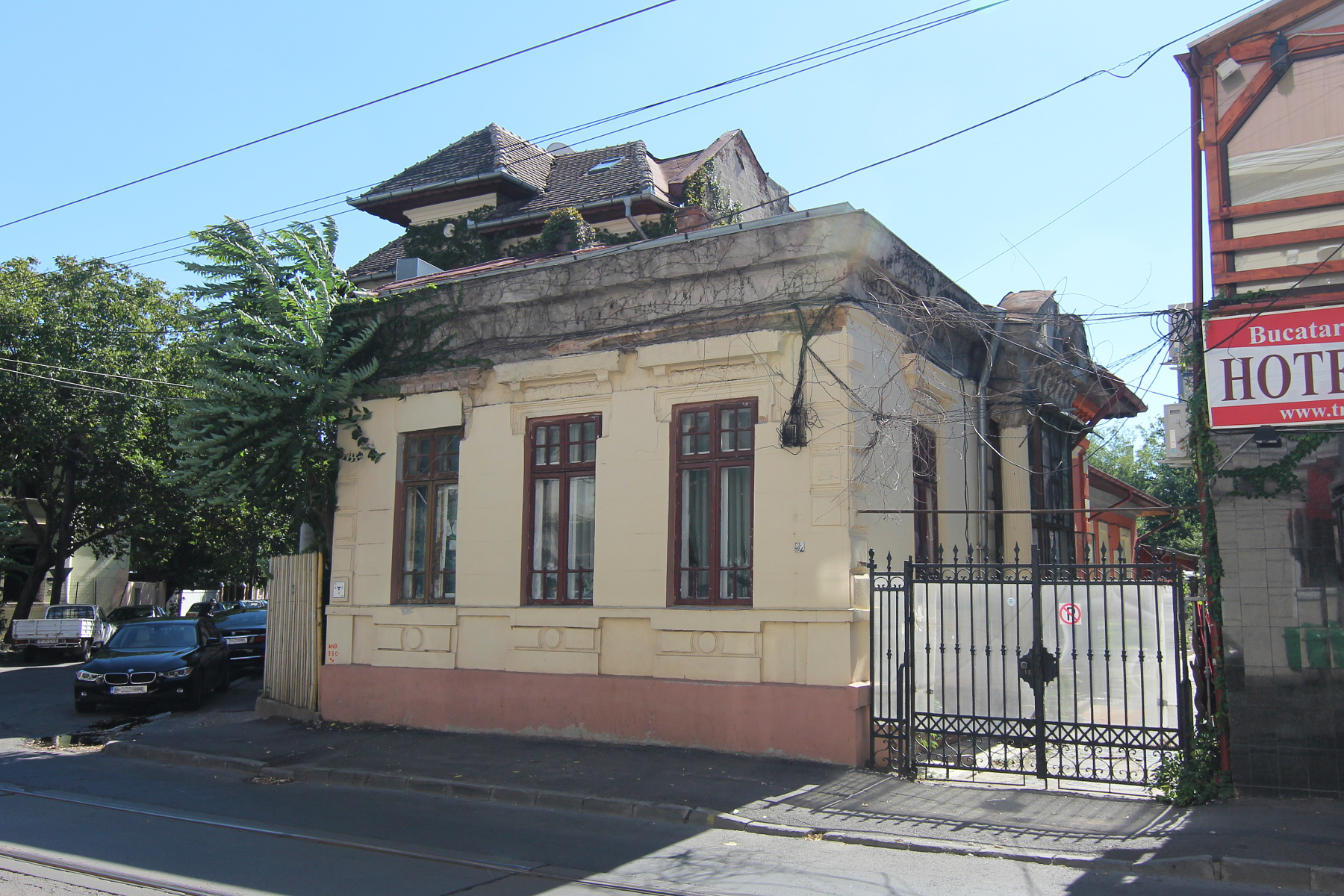 Casă pe Calea Călărașilor